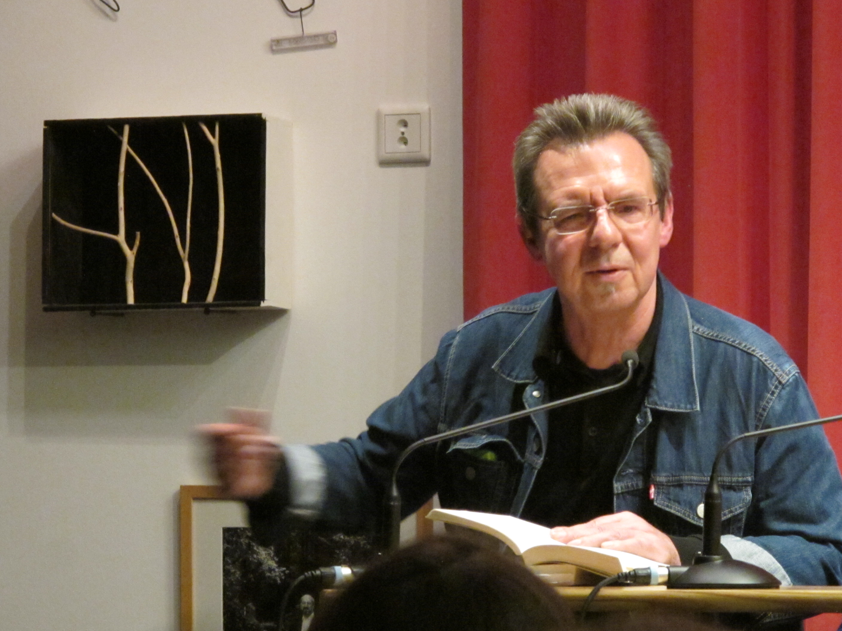 Lesung Lichtung Verlag Januar 2015 im Lyrik Kabinett, Siegfried Völlger